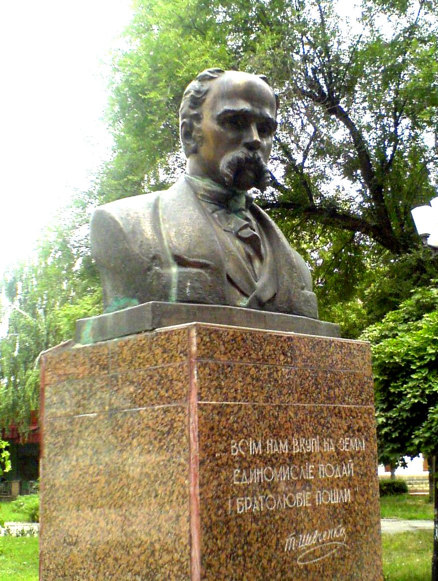 Бюст Тараса Шевченко в Бельцах